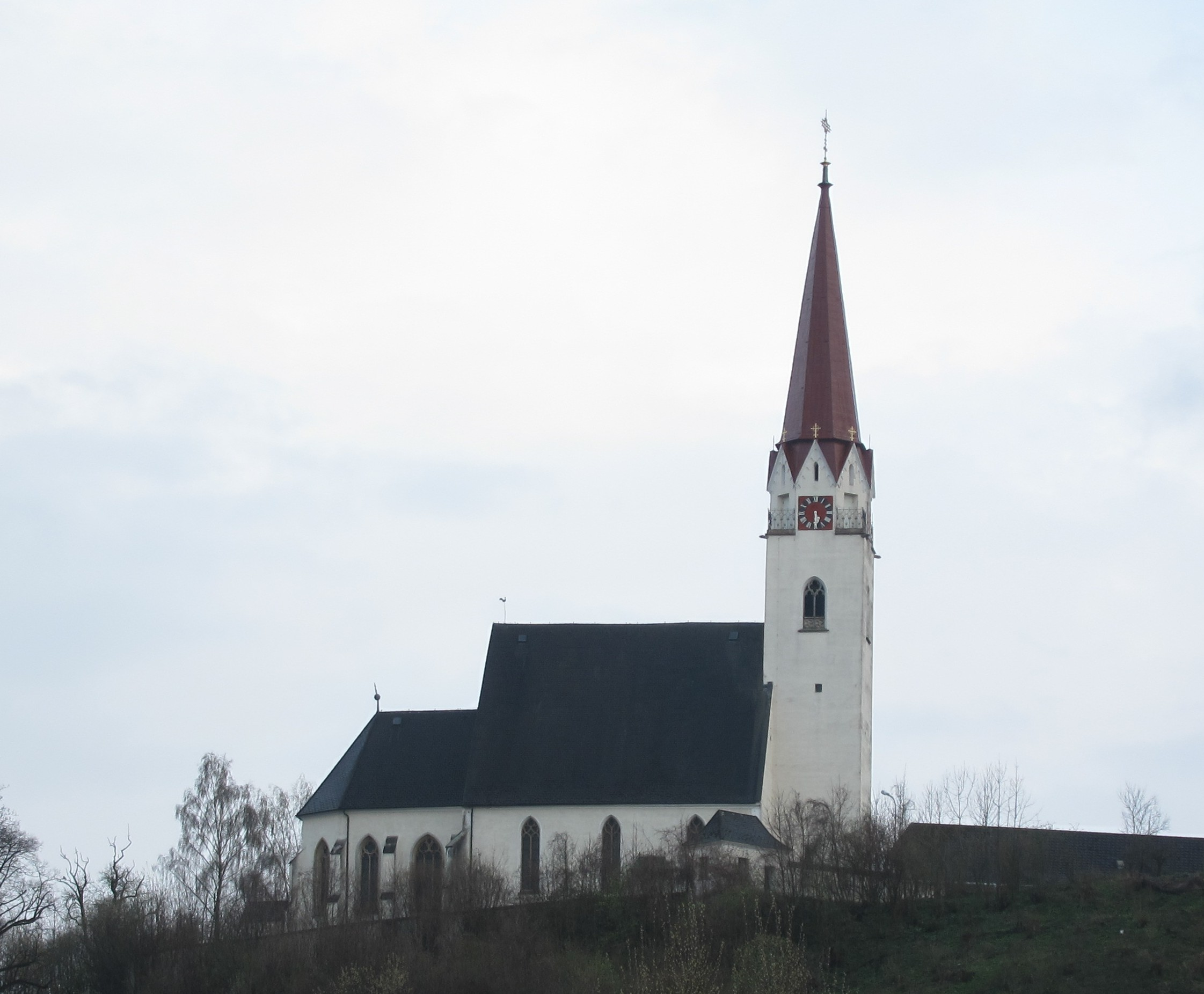 Kath. Pfarrkirche hl. Stephan